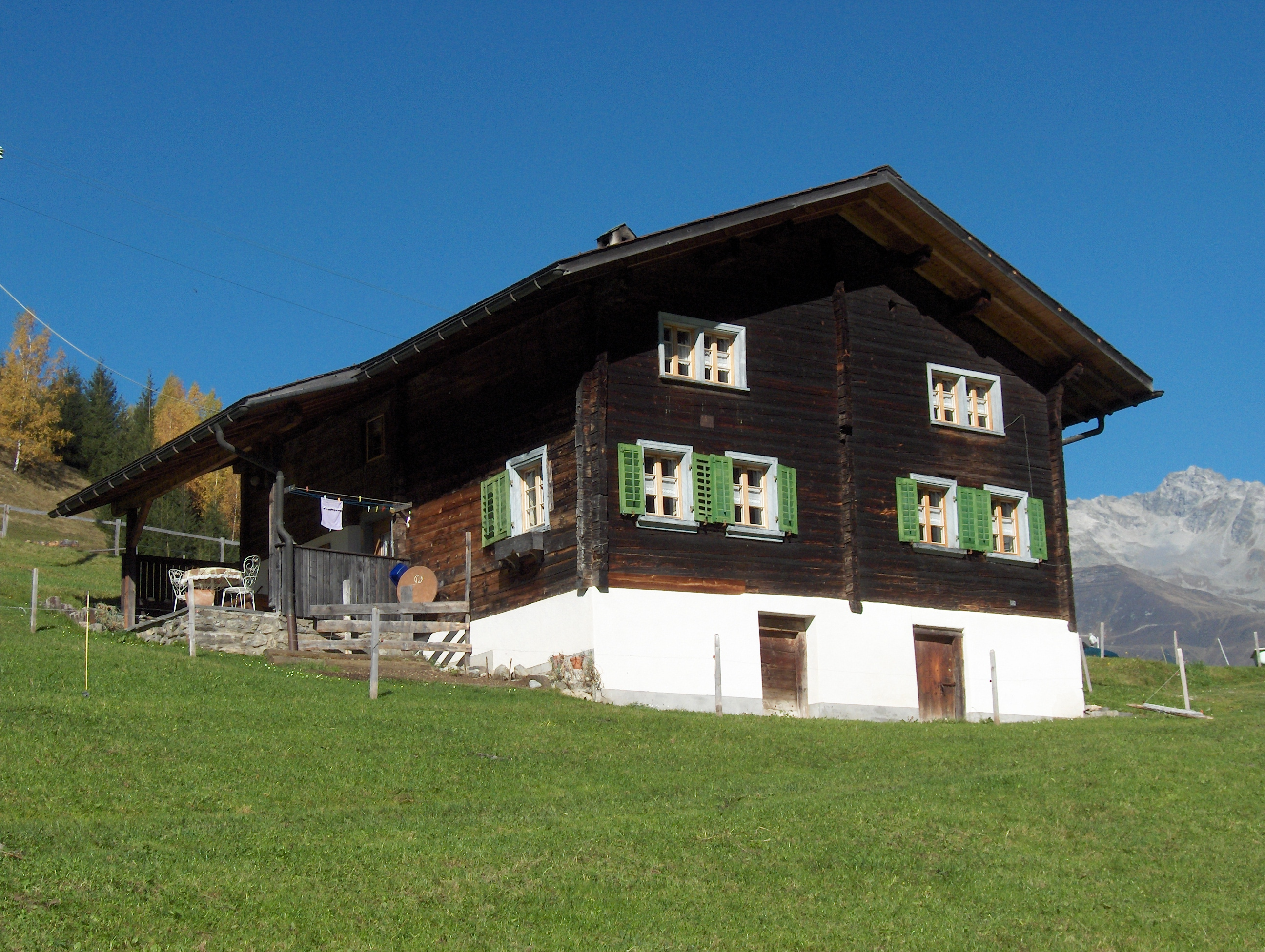 Typisches Bündner-Bergbauernhaus, heute als Ferienhaus genutzt [Portas (Schweiz)]